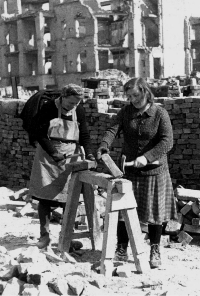 Zwei typische Trümmerfrauen in Berlin